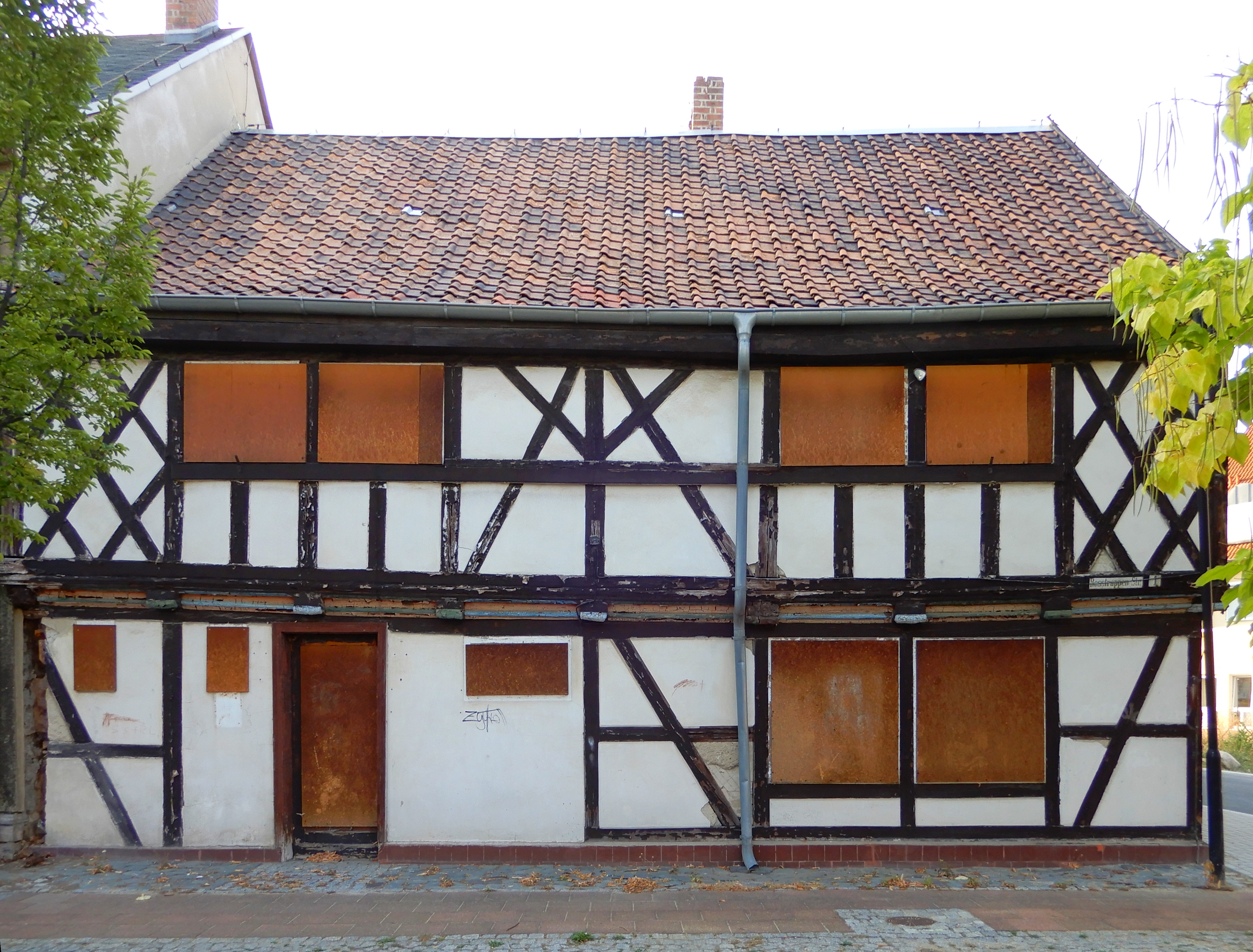 Ehemaliges Gasthaus Brauner Hirsch, Roßtrappenstraße 1, Thale